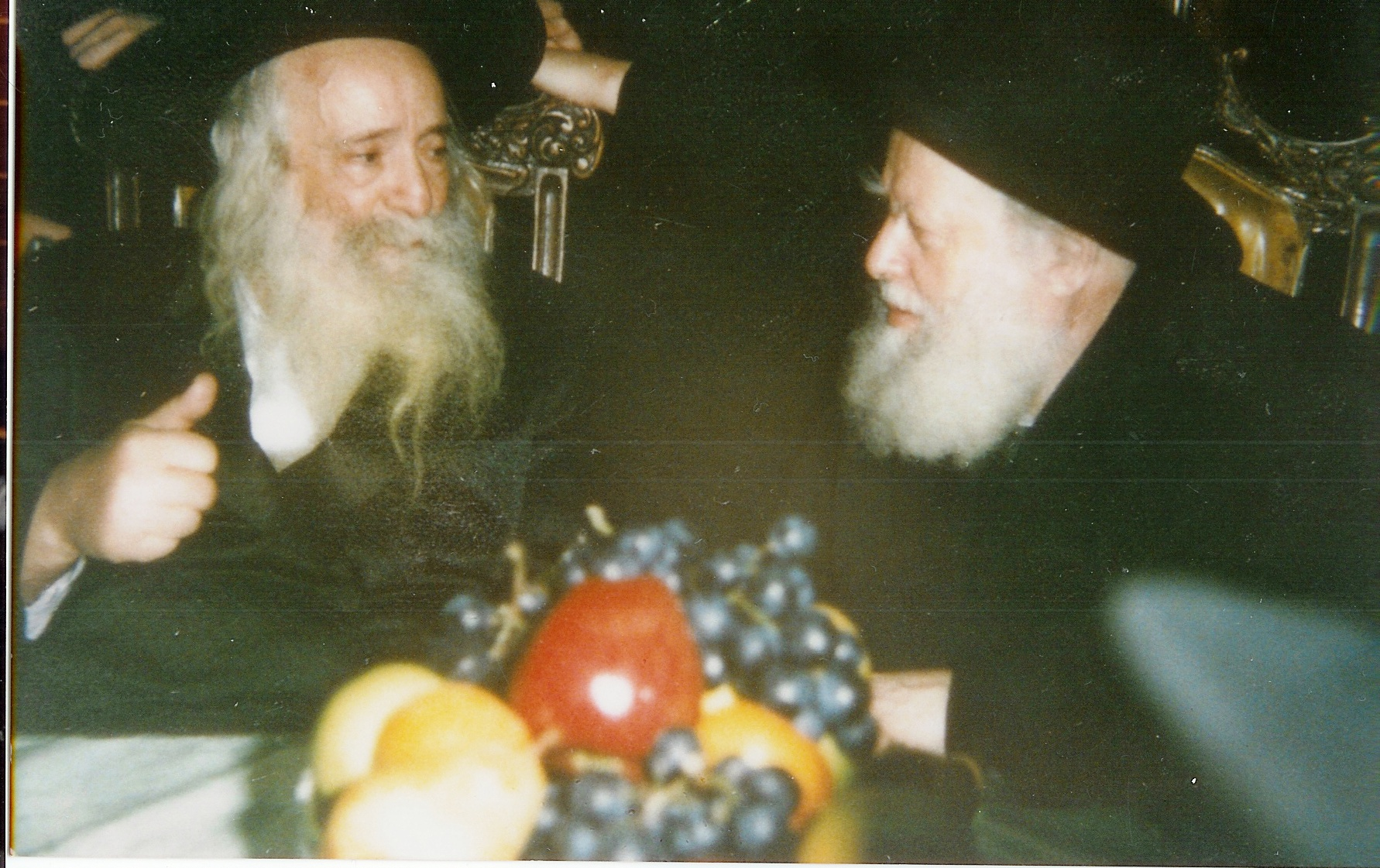 הרב שפירא עם האדמו"ר מצאנז